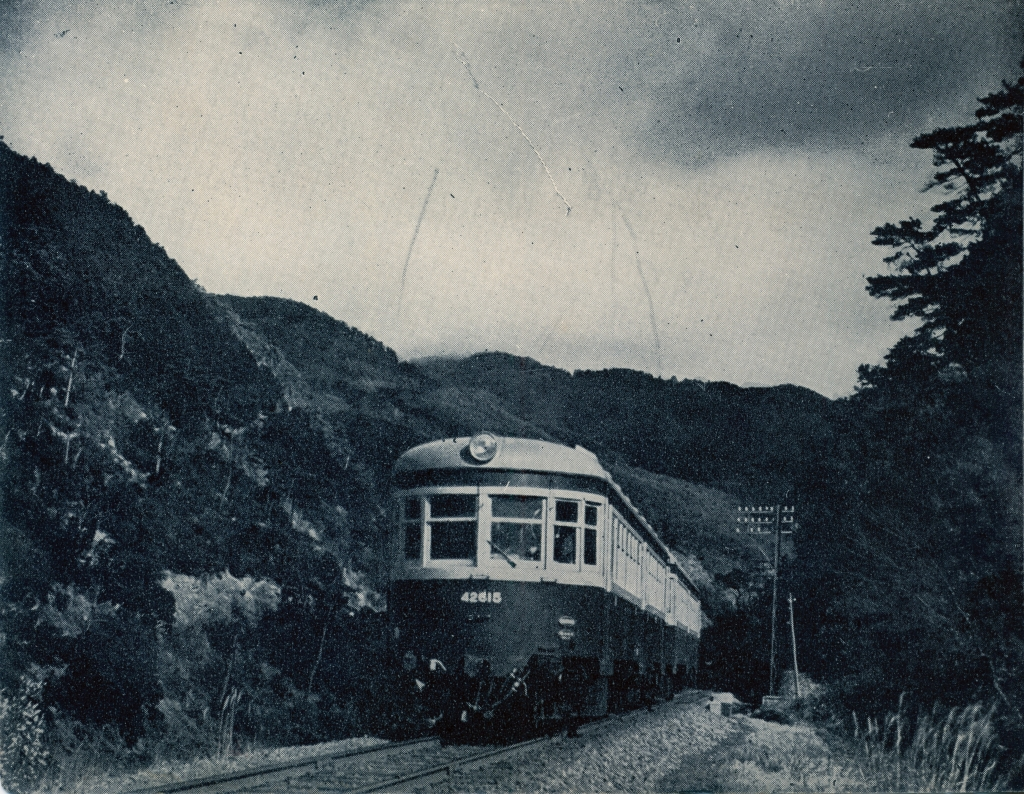 国鉄山陰本線馬堀駅付近を走行するキハ42500形気動車。